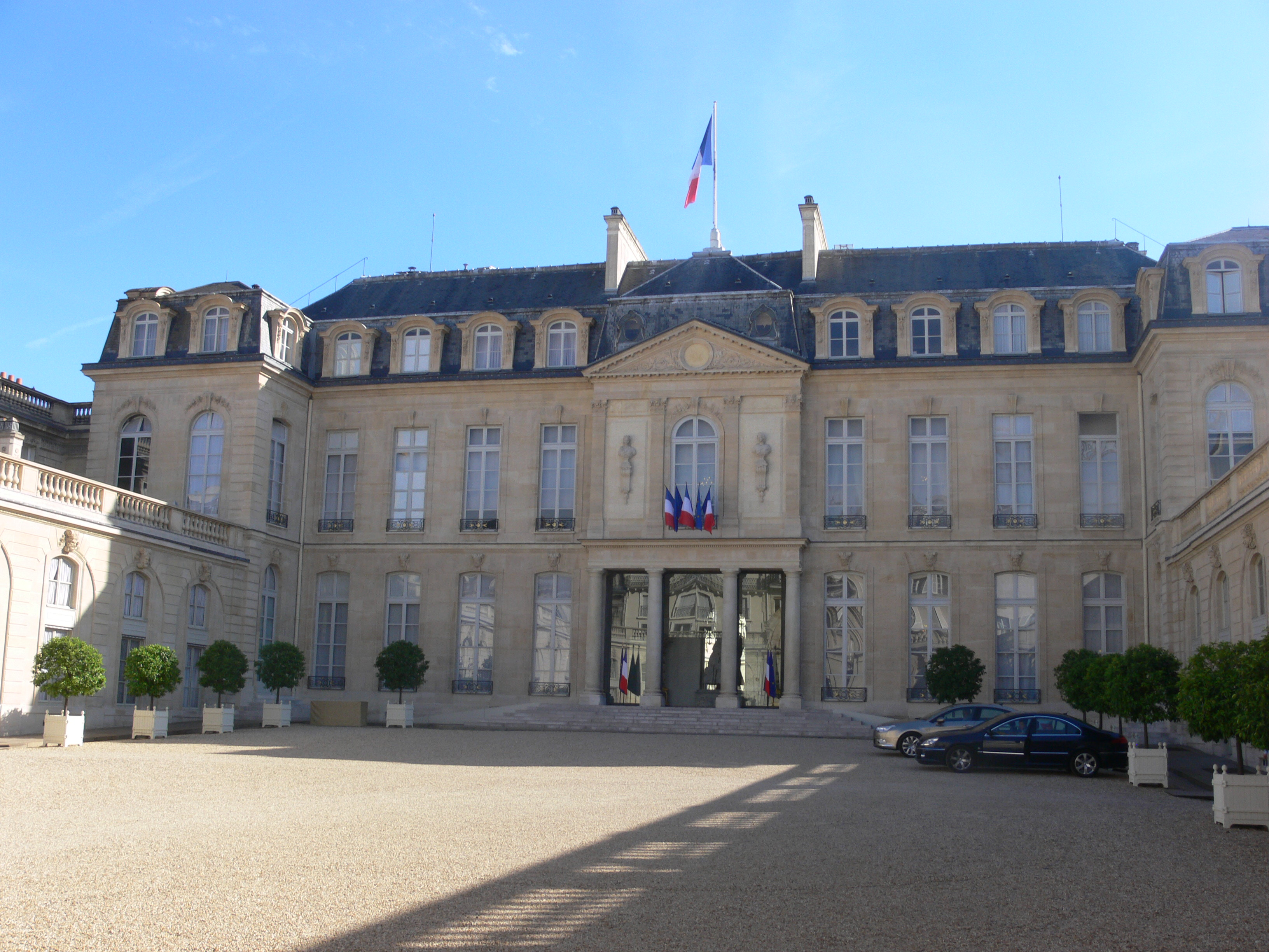 Paris - palais de l'Élysée - cour